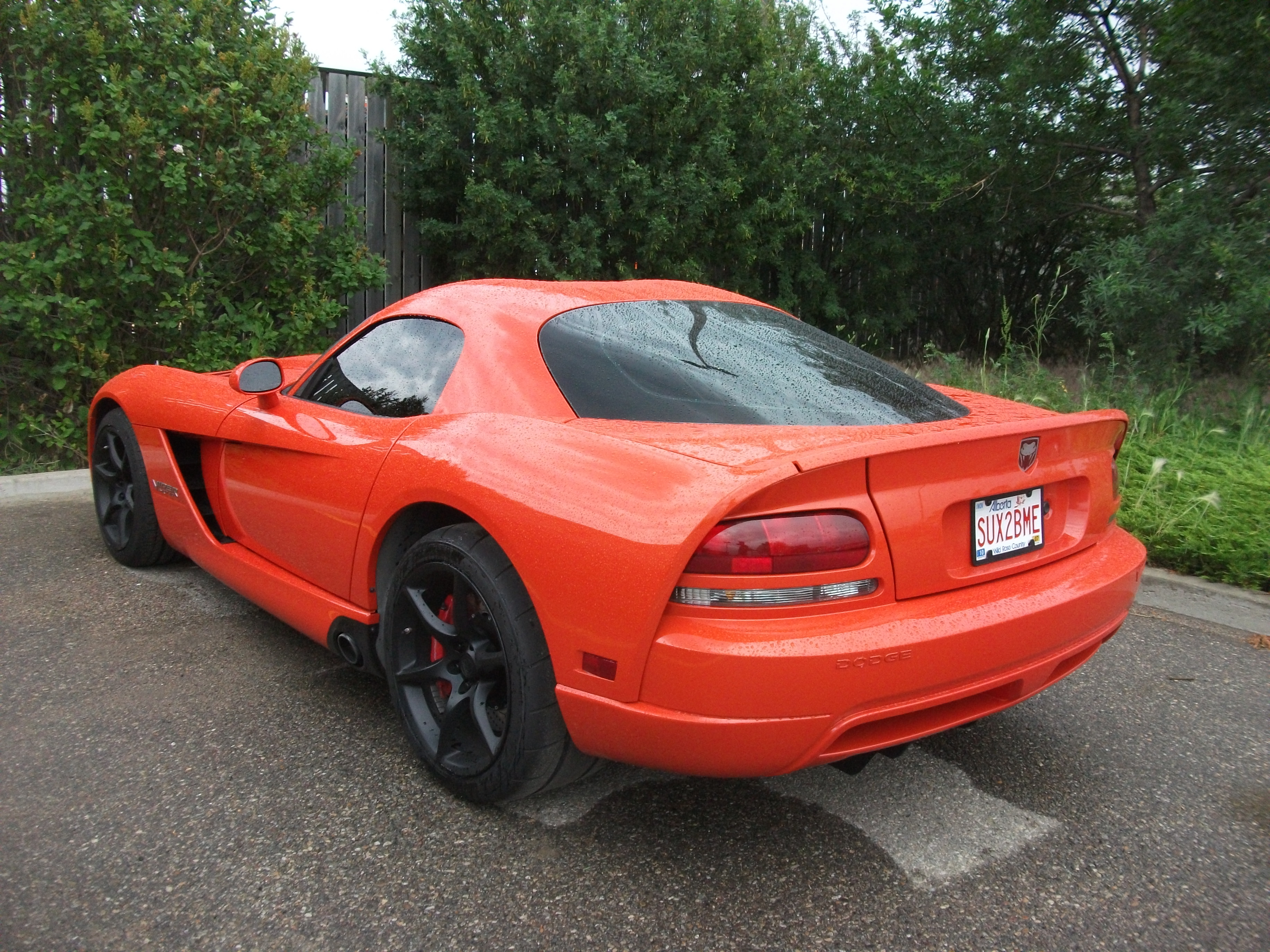 Dodge Viper SRT10